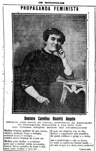 Captura del periódico Os Ridículos, del 16 de agosto de 1911. Reseña sobre Carolina Beatriz Ângelo